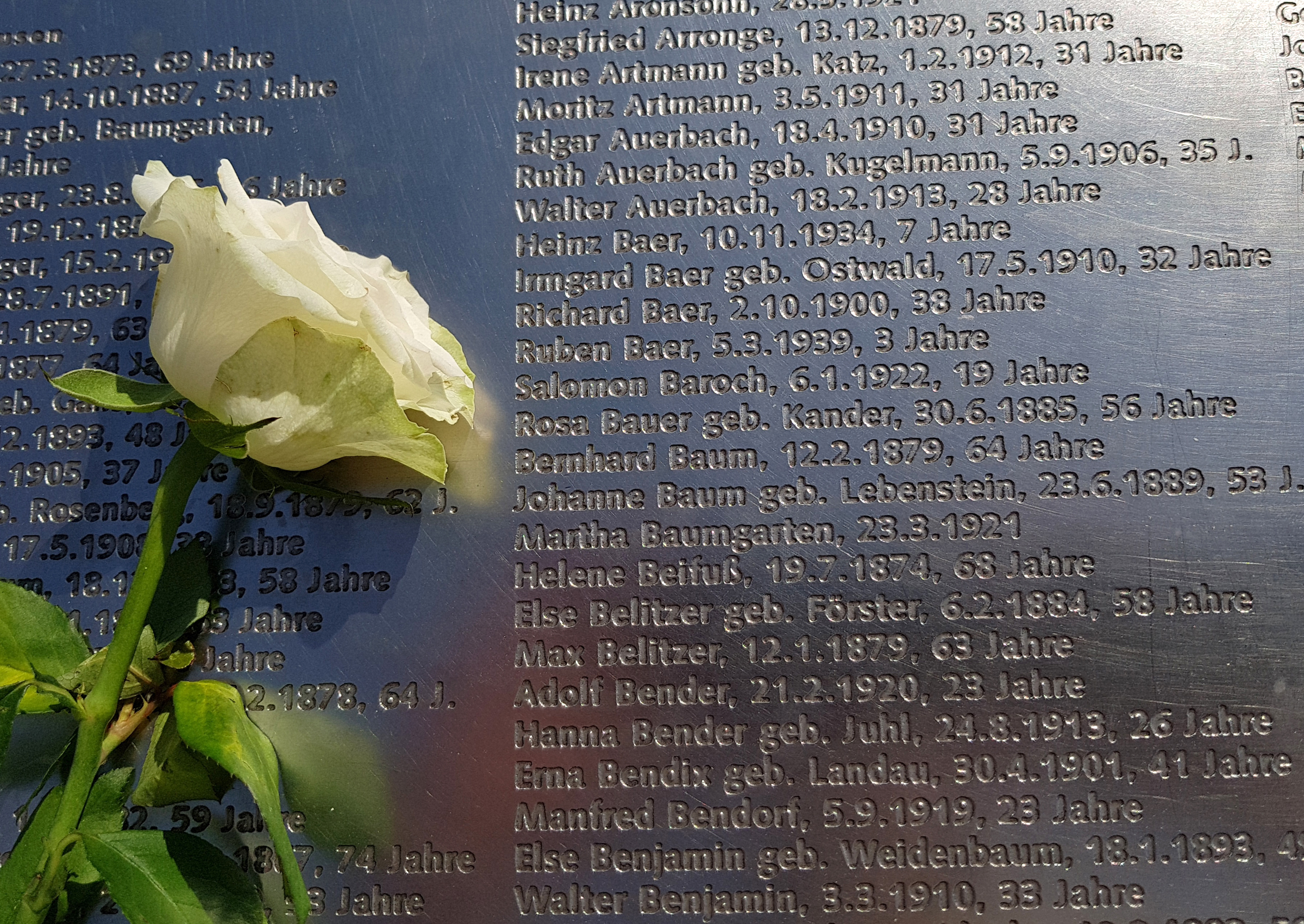 Mahnmal am Hauptbahnhof Bielefeld: Deportation von Juden am 31. Juli 1942. Ausschnitt Familie Baer